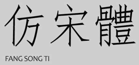 Style de caractères chinois Fang Song Ti